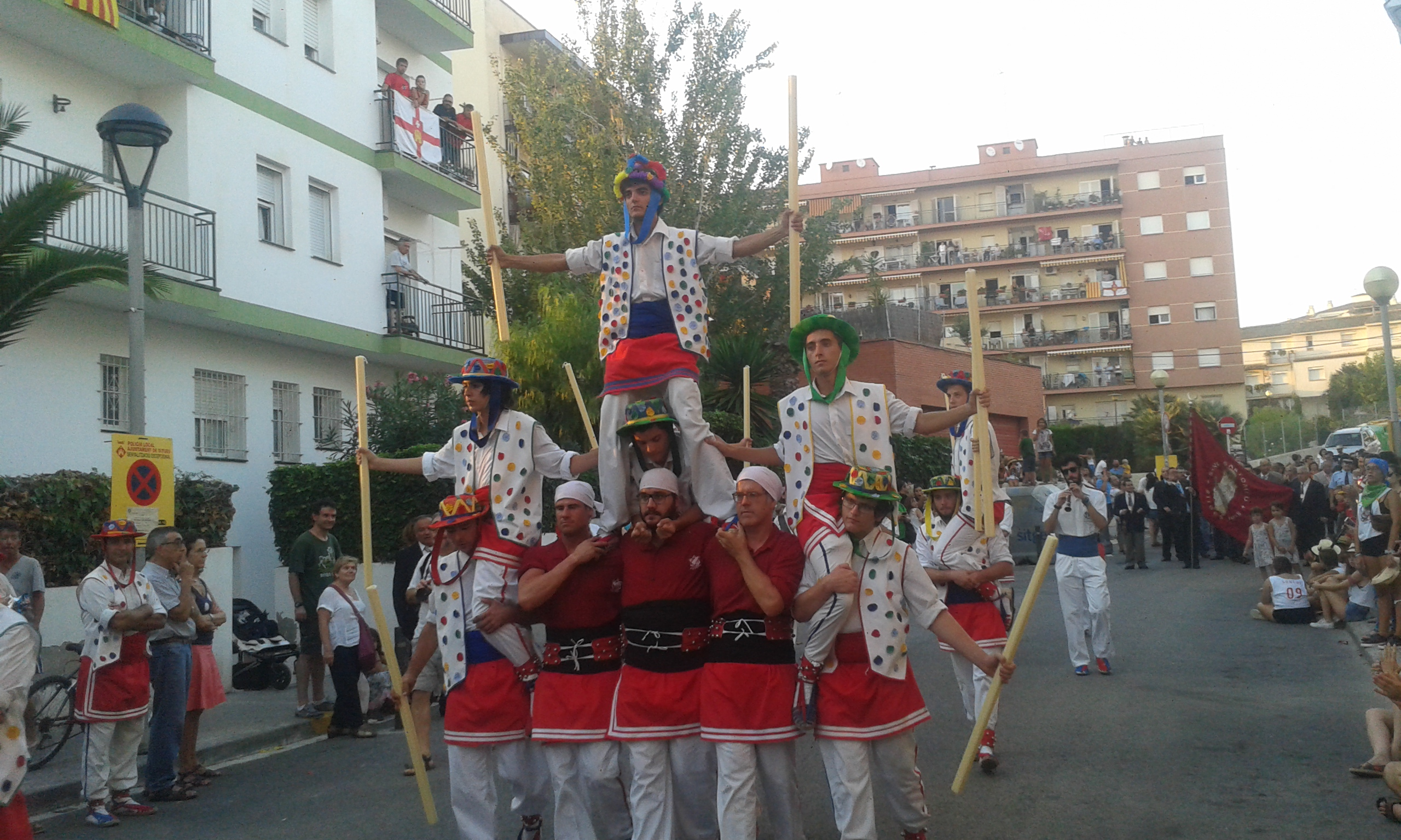 Moixiganga de Sitges durant la Festa Major del 2015